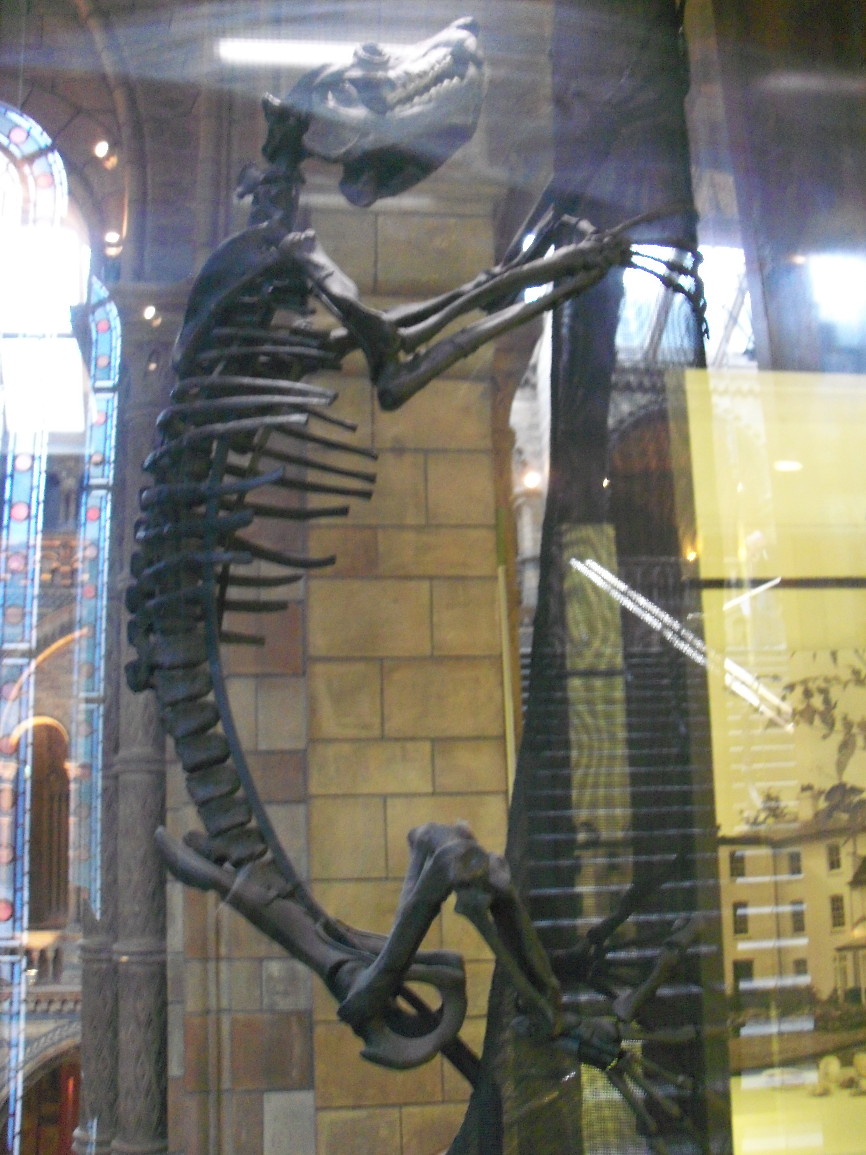 Megaladapis, NMH, London.